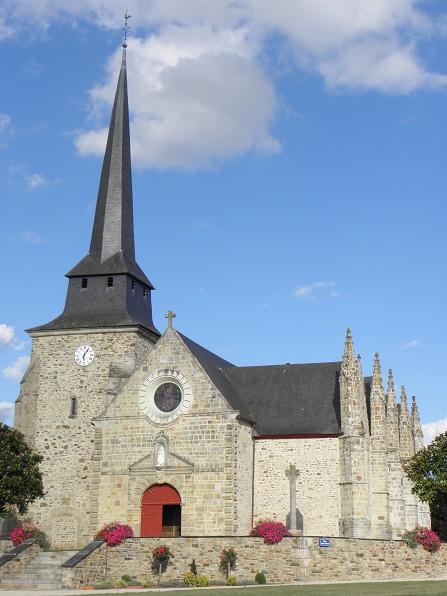 Eglise de Moutiers (35)